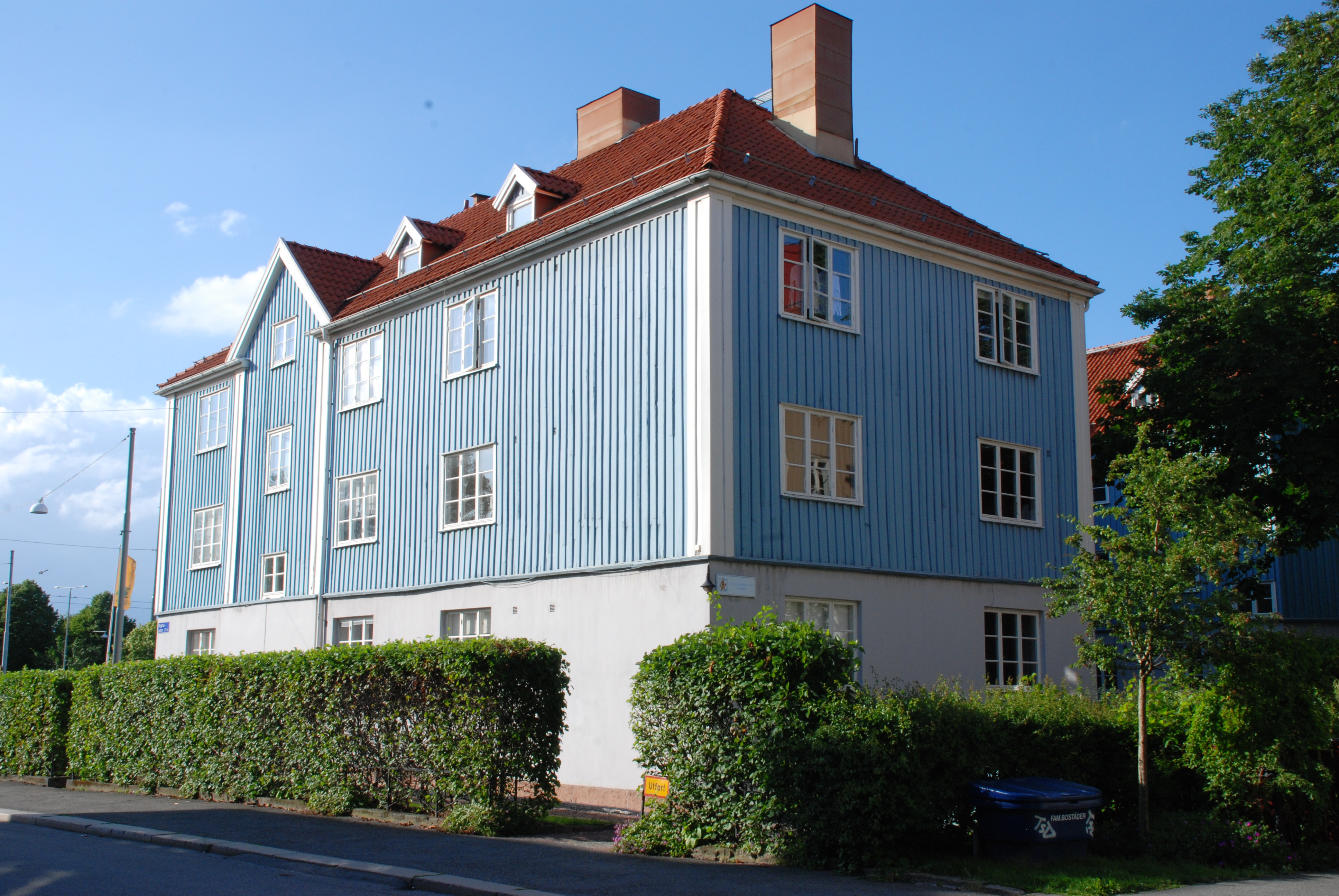 Kvarteret Blåklinten, Birgittagatan 2/Karl Johansgatan 114, i stadsdelen Kungsladugård i Göteborg.